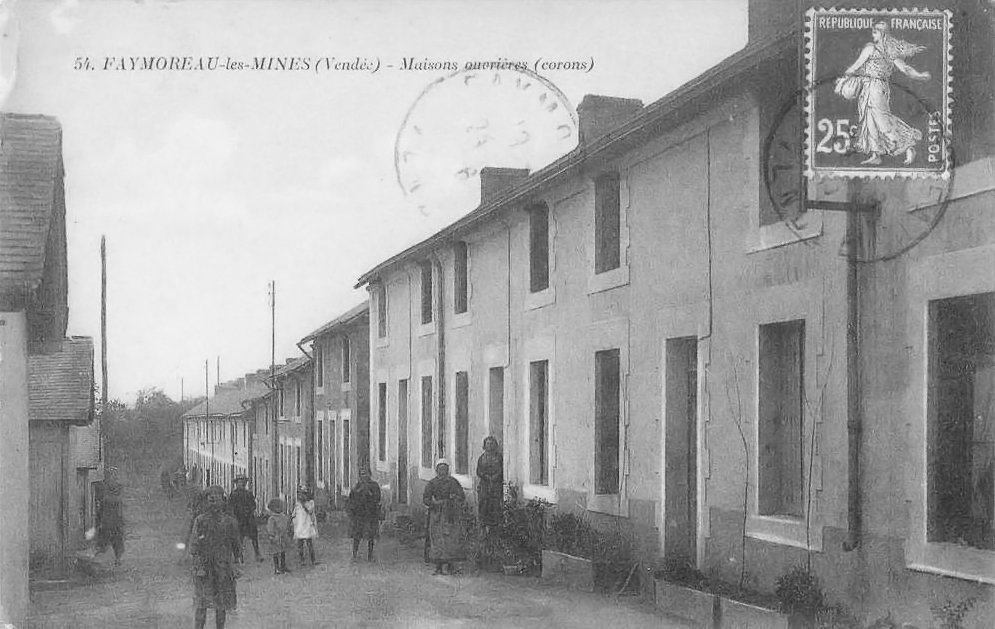 Puits du bassin houiller de Faymoreau (Vendée, France).